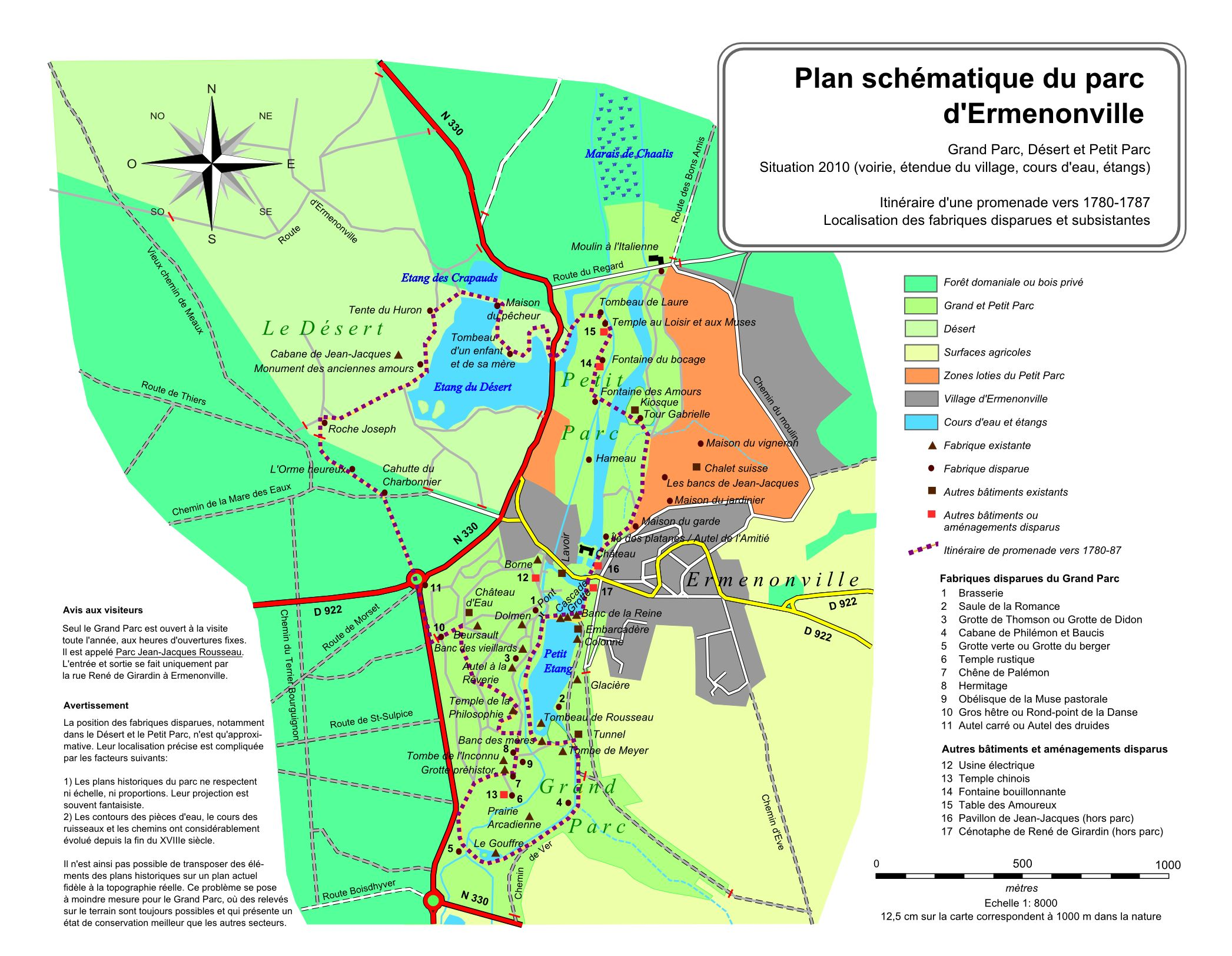 Plan schématique du parc d'Ermenonville, situation en 2010. Localisation des fabriques existantes et disparues, itinéraire de promenade vers 1780-1787. Le parc Jean-Jacques Rousseau correspond au Grand Parc.